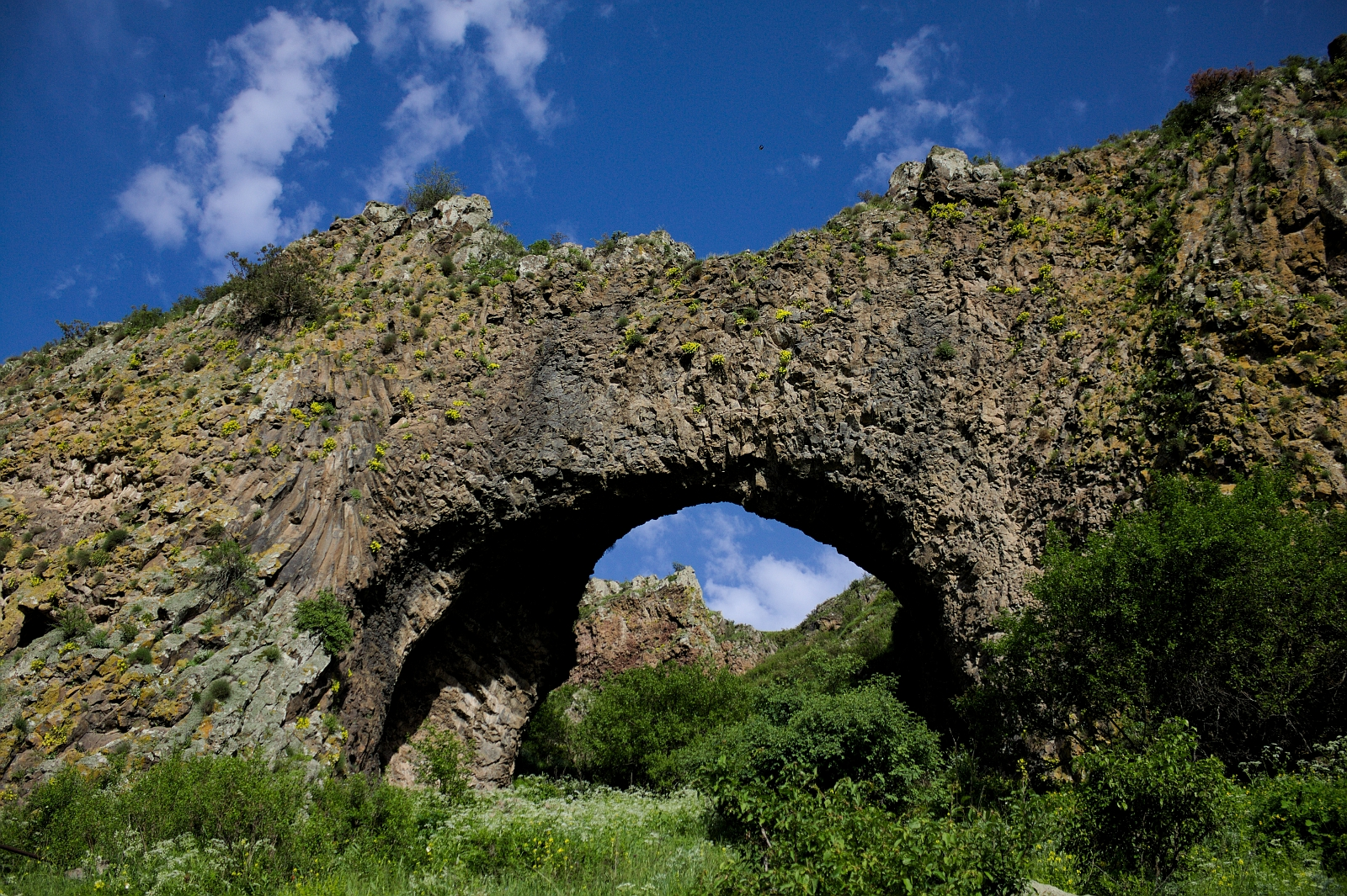 Ծակ Քար․ Բջնի